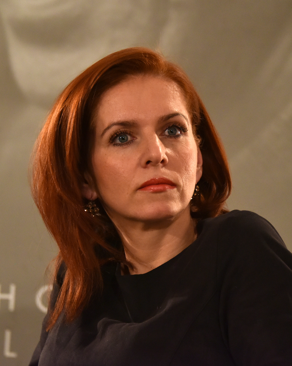 Nora Fridrichová (2019)